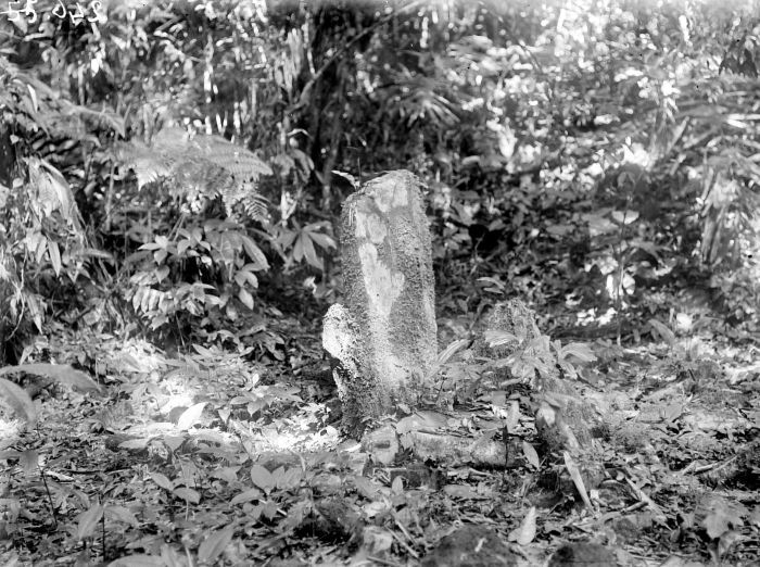 Négatif. Undakan pada situs mégalitik di Kosala, Banten.